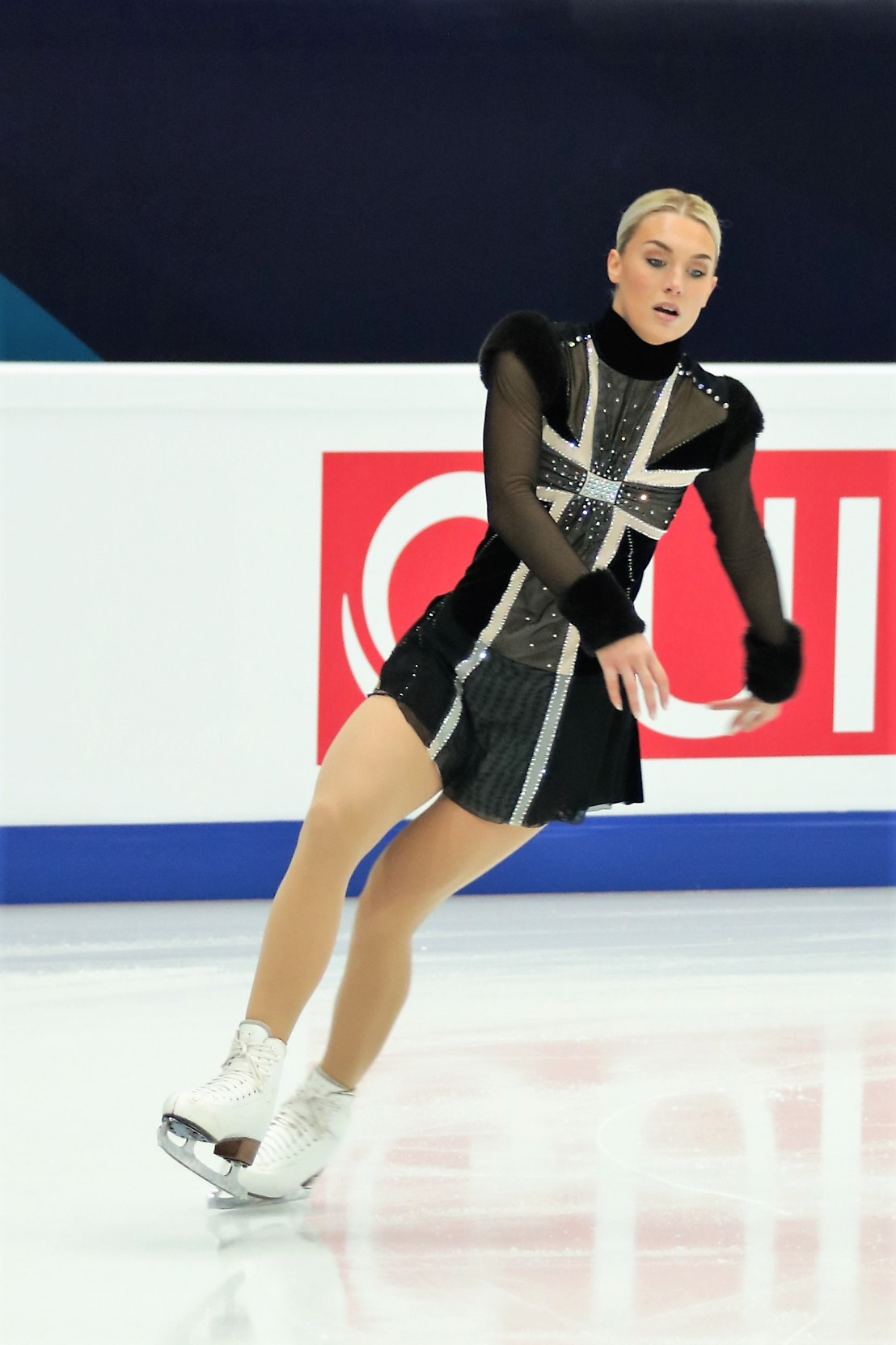 Пернилл Соренсен (Дания) на Чемпионате Европы по фигурному катанию 2018.